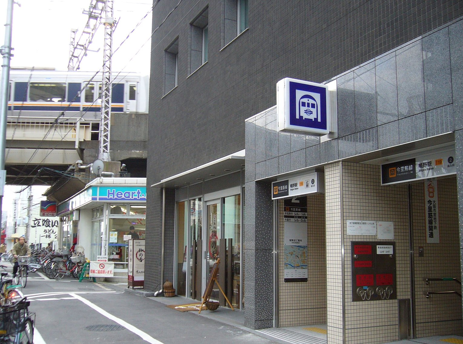 JR片町線・大阪市交今里筋線鴫野駅 手前は地下鉄2号出入口 ハートインの向こうにJRの駅舎がある 2006年12月24日 Bakkai撮影